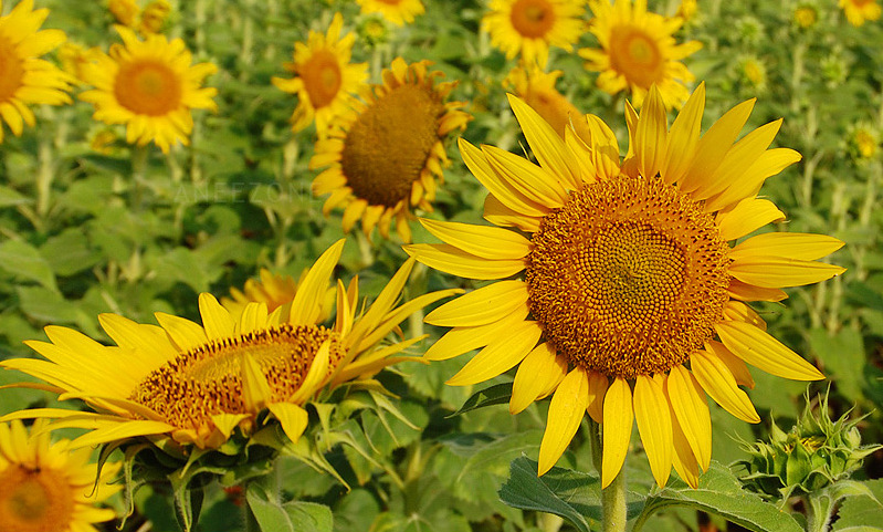 തമിഴ് നാട്ടിലെ സൂര്യ കാന്തി